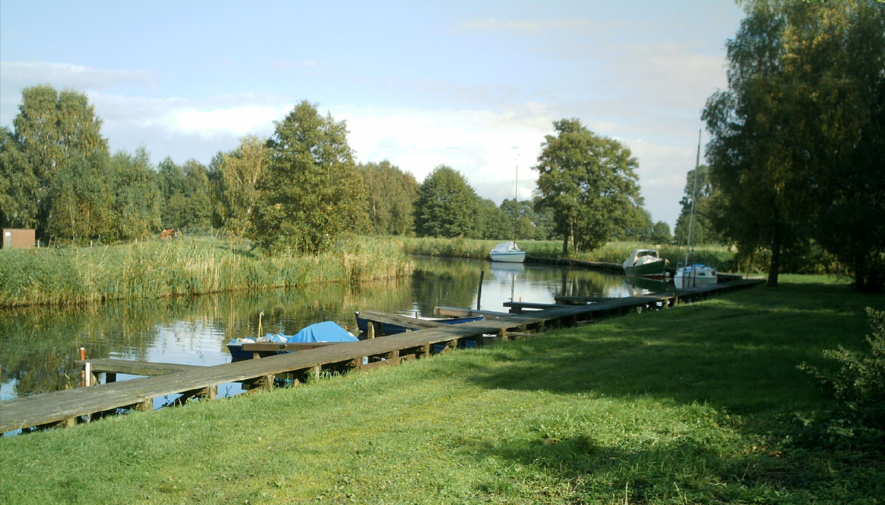 Anlegestelle bei Grambin